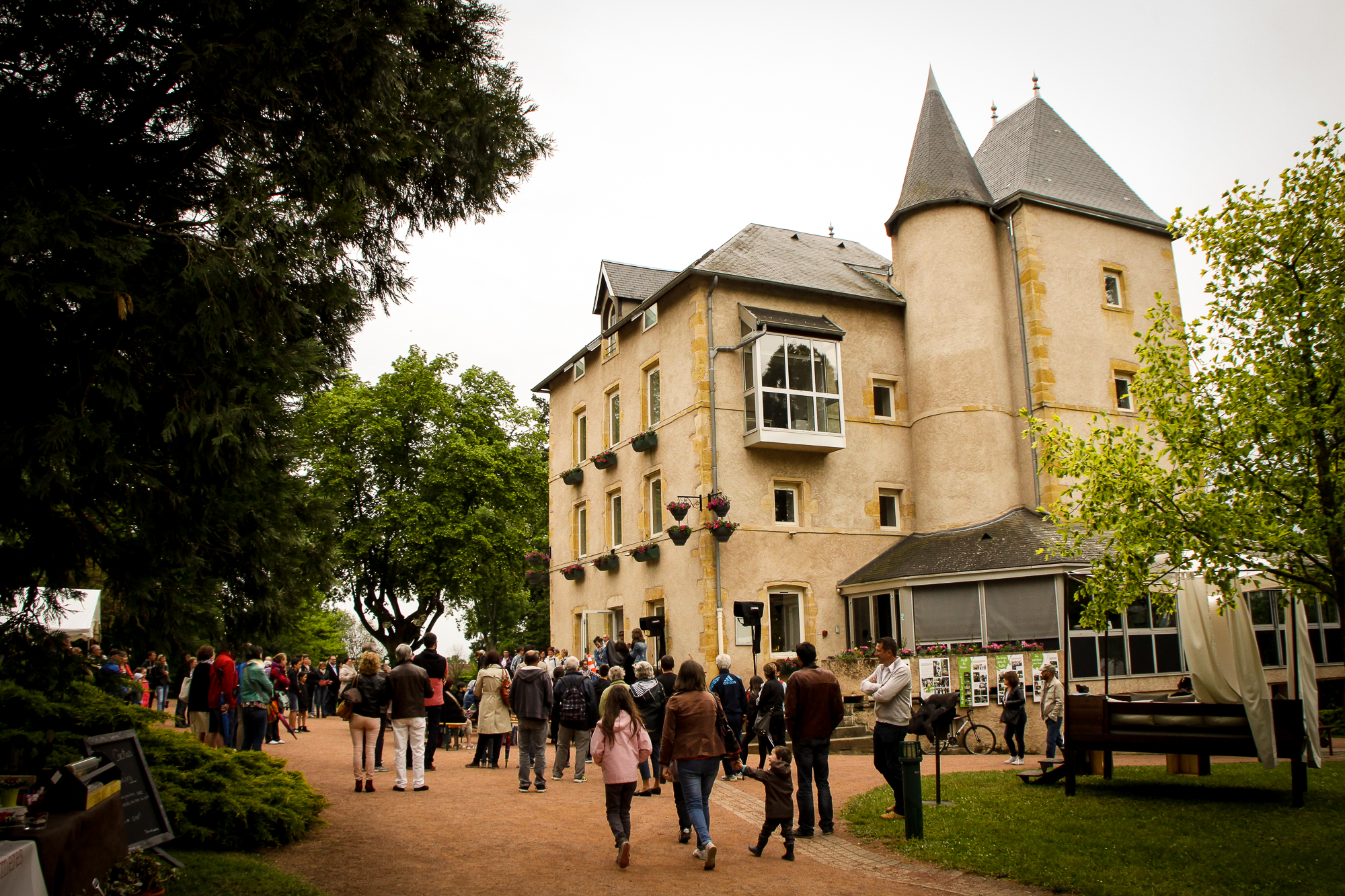 Le Château de Beaulieu à Riorges.